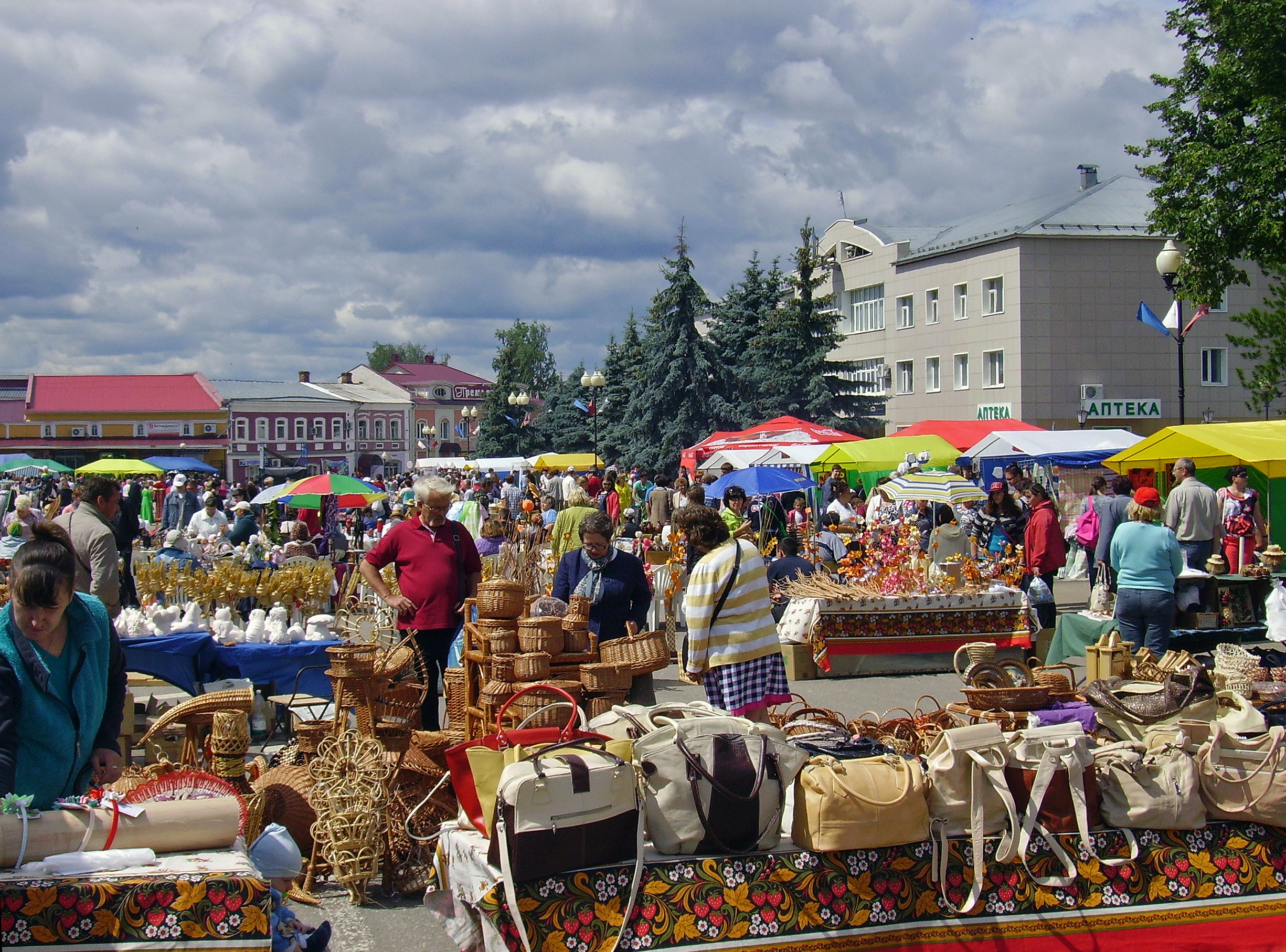 Семёнов. Ярмарка ремёсел на центральной площади города.